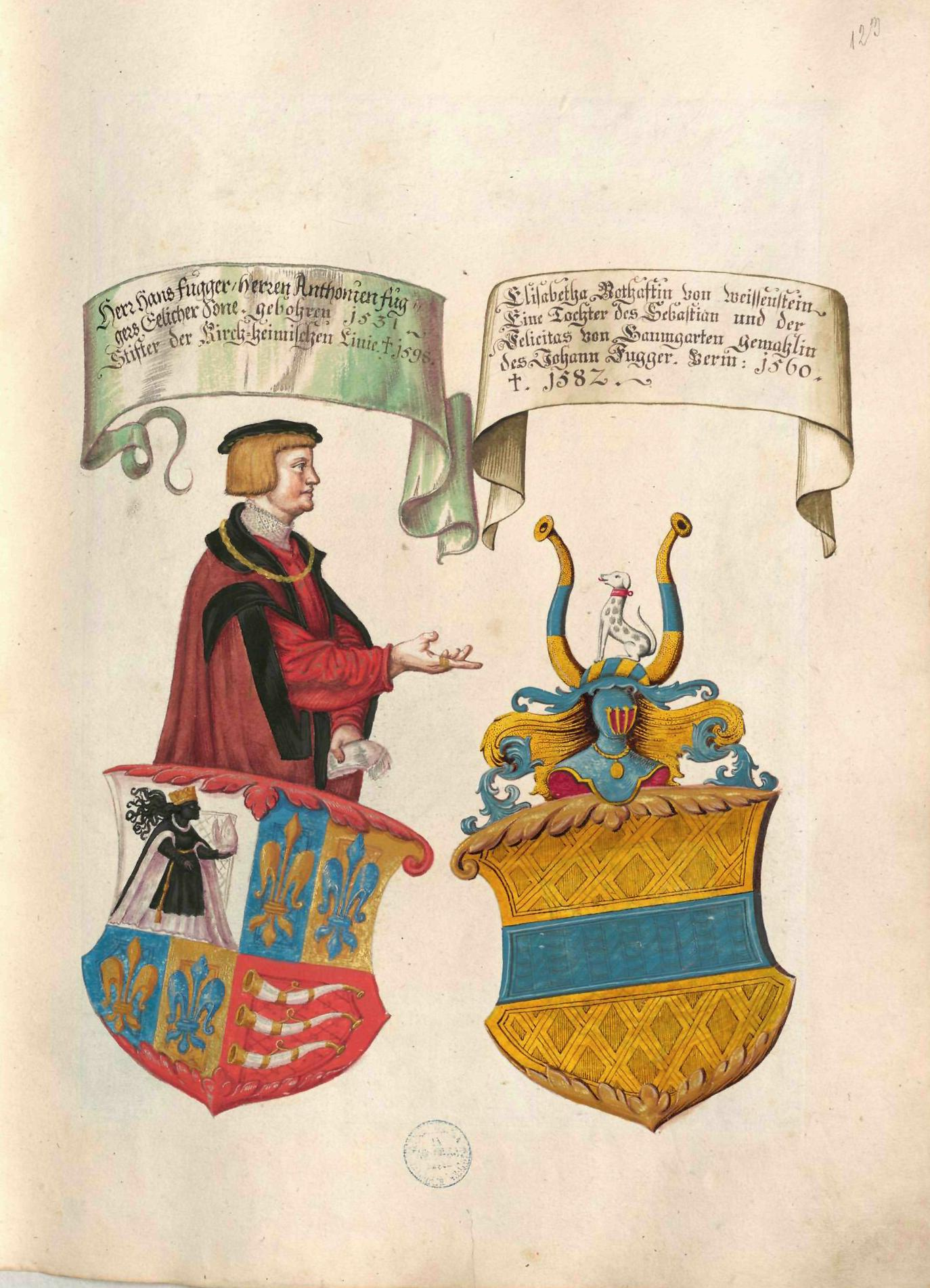 Geheimes Ehrenbuch der Fugger, hergestellt in der Werkstatt Jörg Breu d. J., 1545–1549 Portrait- und Wappendarstellung